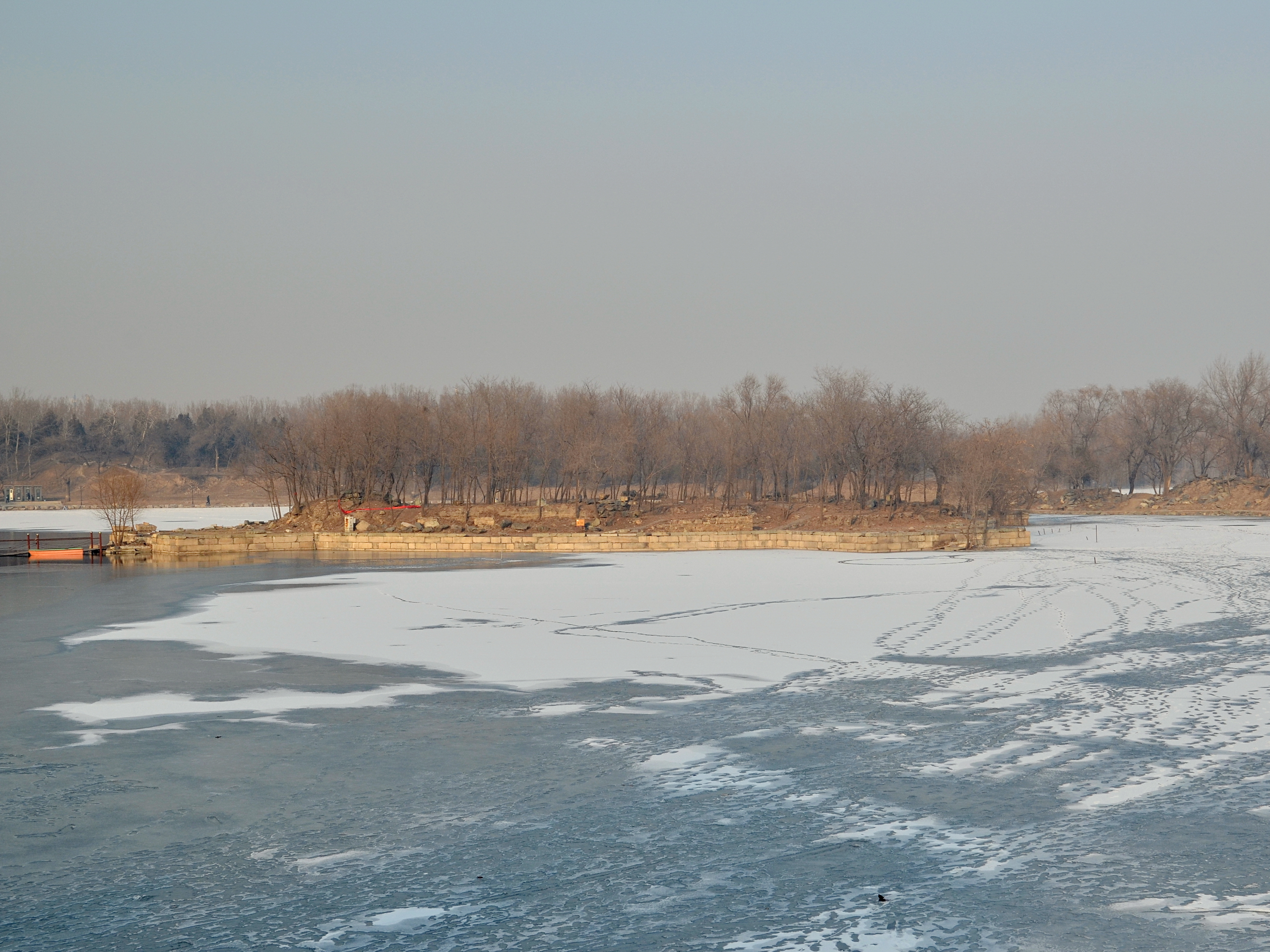 长春园海岳开襟遗址